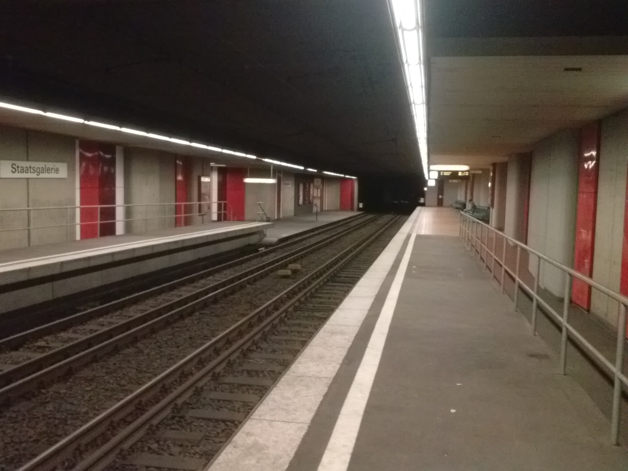 Die Haltestelle Staatsgalerie im Februar 2014